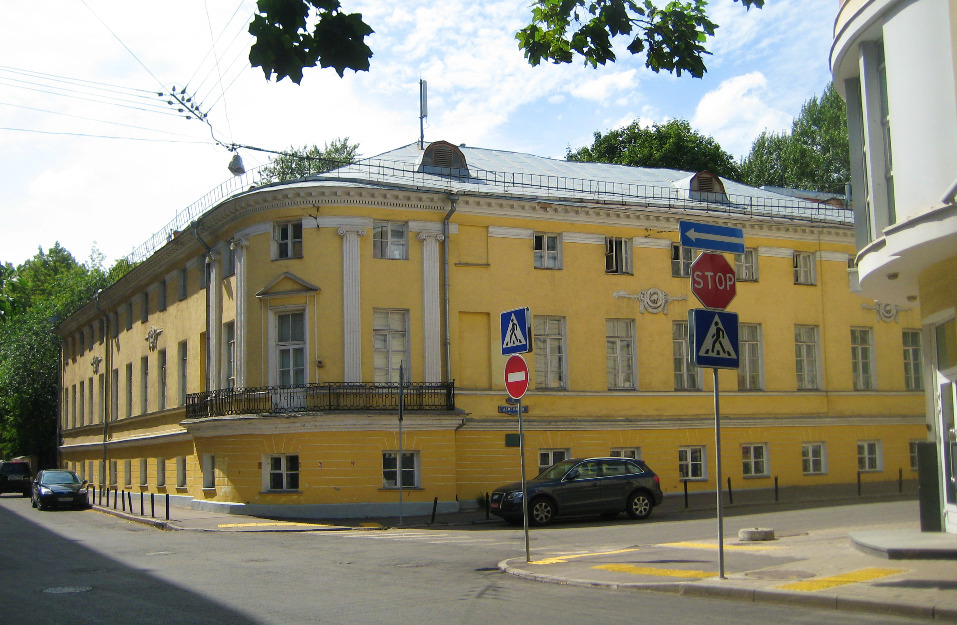 Денежный переулок 1 Большой Лёвшинский пер., 8/1 строение 1 Дом дворцового ведомства Начало XIX века. Объект культурного наследия. Здесь располагаются: Международный художественный фонд; полиграфическая компания «Квадрат-XXI век»; Росмедпром.